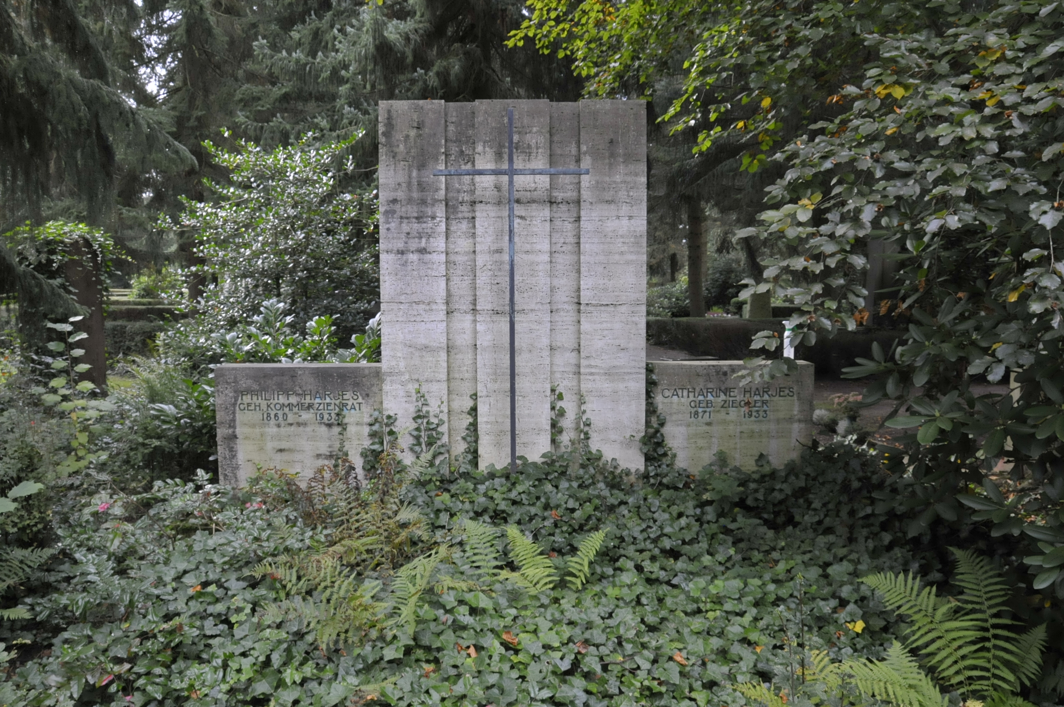 Grabmal des Unternehmers Philipp Harjes (1866-1933) und seiner Frau Catherine Harjes geb. Ziegler (1871-1933) auf dem Hauptfriedhof in Gotha